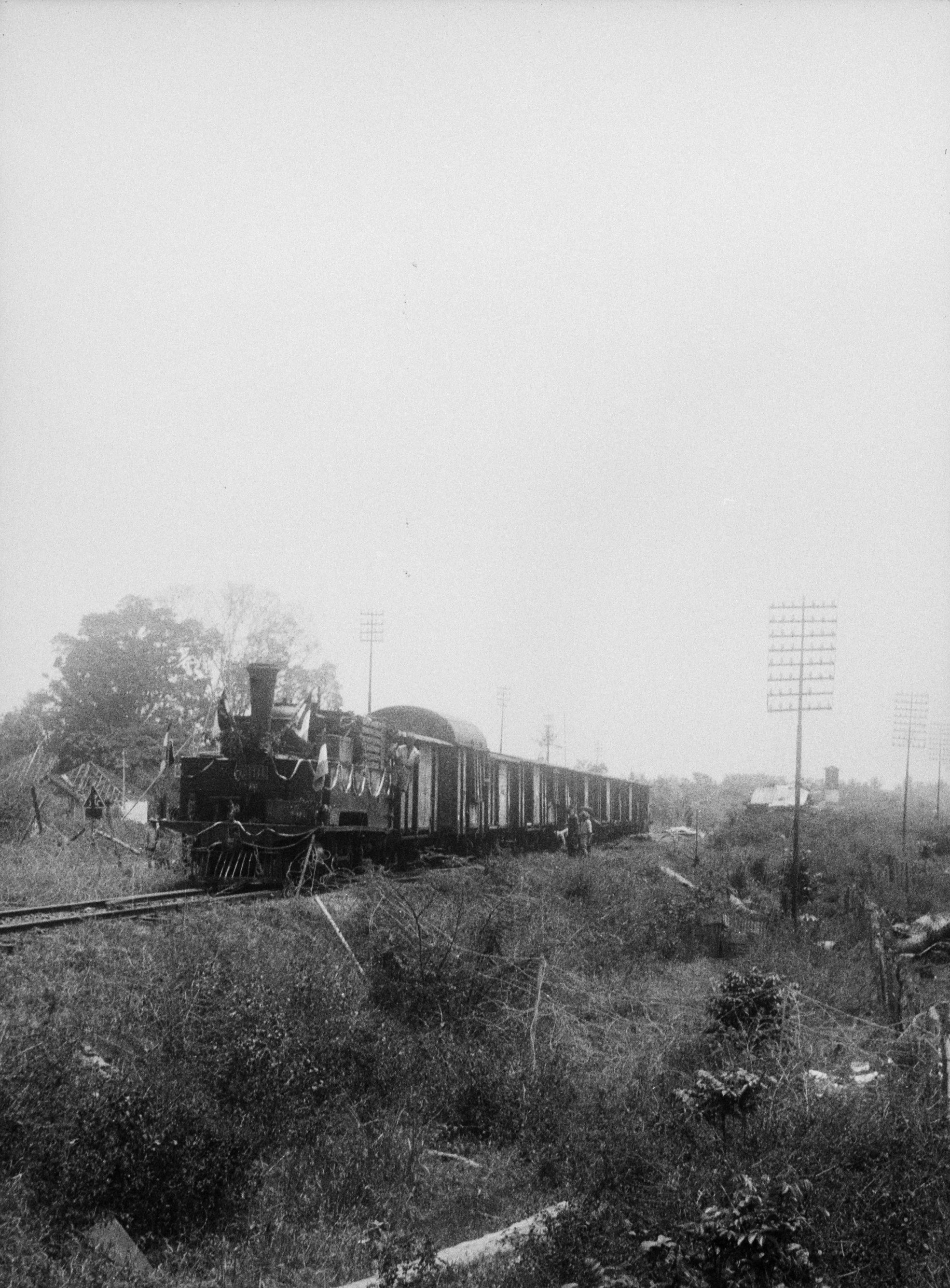 Collectie / Archief : Fotocollectie Dienst voor Legercontacten Indonesië Reportage / Serie : [DLC] Bandoeng doop Irenebrug door CO Amacab Beschrijving : Doop van de herstelde spoorbrug over de Tjitaroem bij Dajeuhkolot (Irenebrug) door Co Amacab [Commanding Officer — Allied Military Authority, Civil Affairs Branch]. Een versierde trein Datum : 3 oktober 1946 Locatie : Bandung, Indonesië, Nederlands-Indië Fotograaf : Fotograaf Onbekend / DLC Auteursrechthebbende : Nationaal Archief Materiaalsoort : Negatief (zwart/wit) Nummer archiefinventaris : bekijk toegang 2.24.04.03 Bestanddeelnummer : 10217